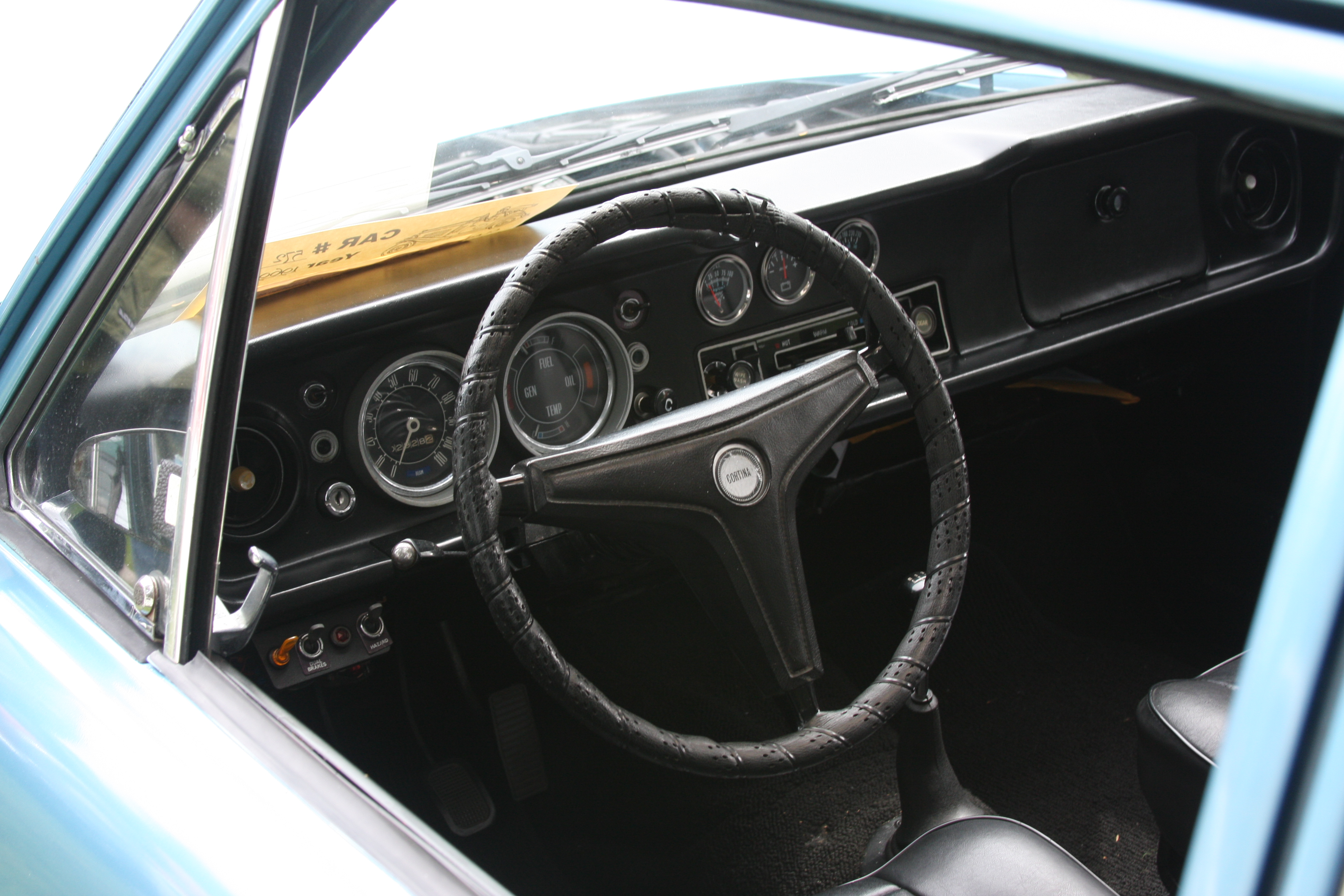 Ford Cortina interior